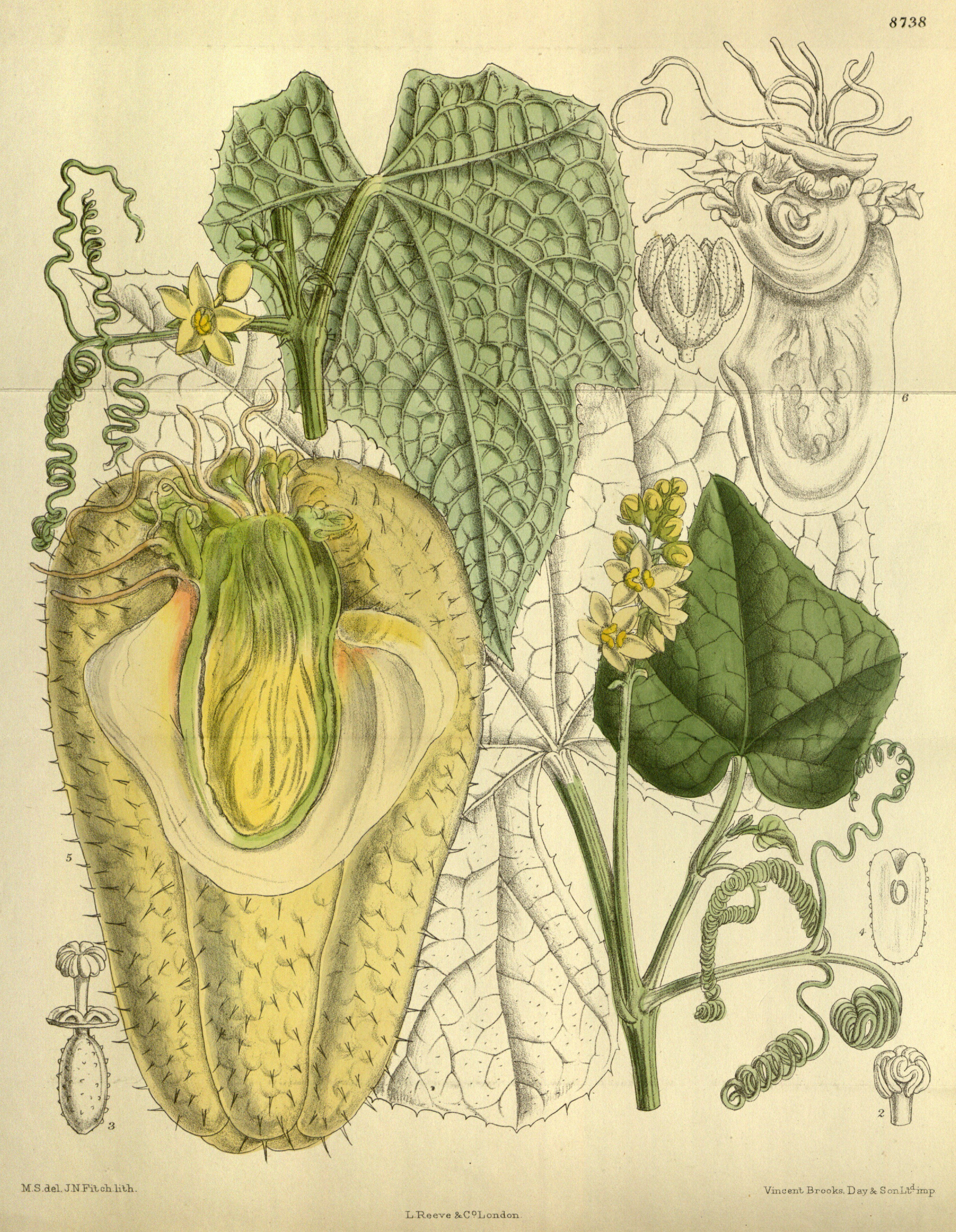 Sechium edule, Cucurbitaceae